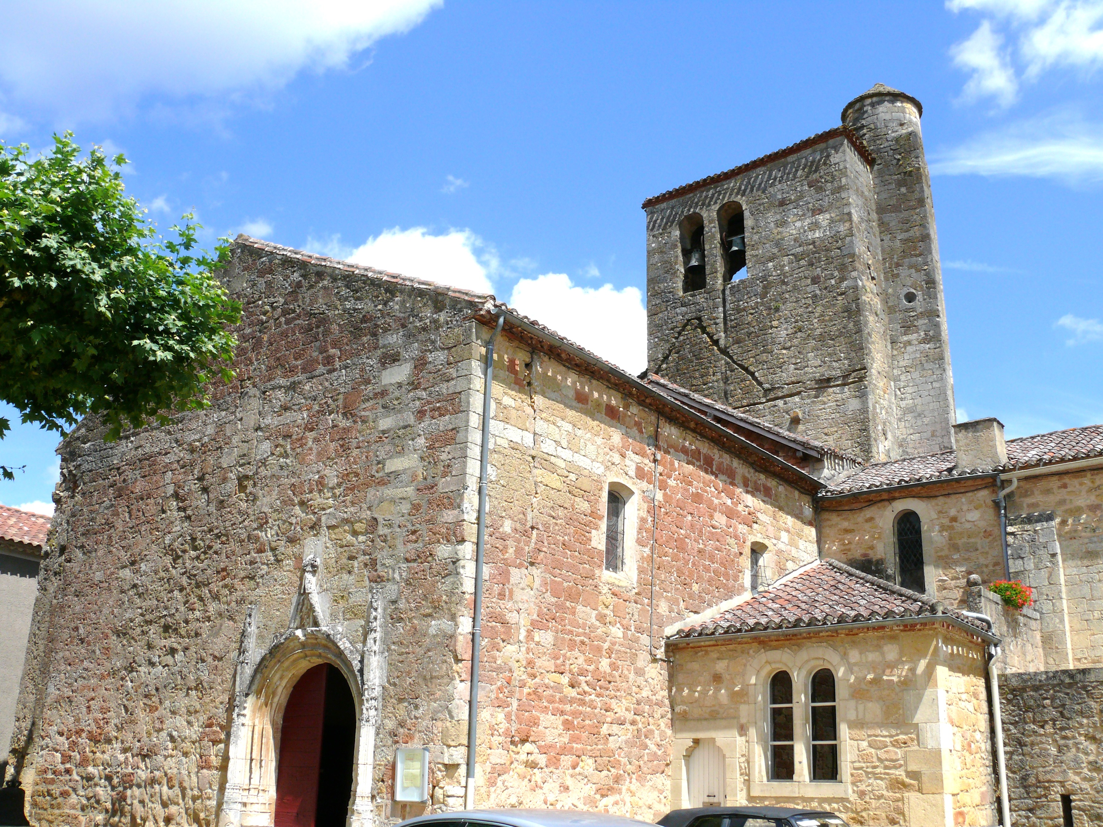 Saint-Front-sur-Lémance - Eglise Saint-Front